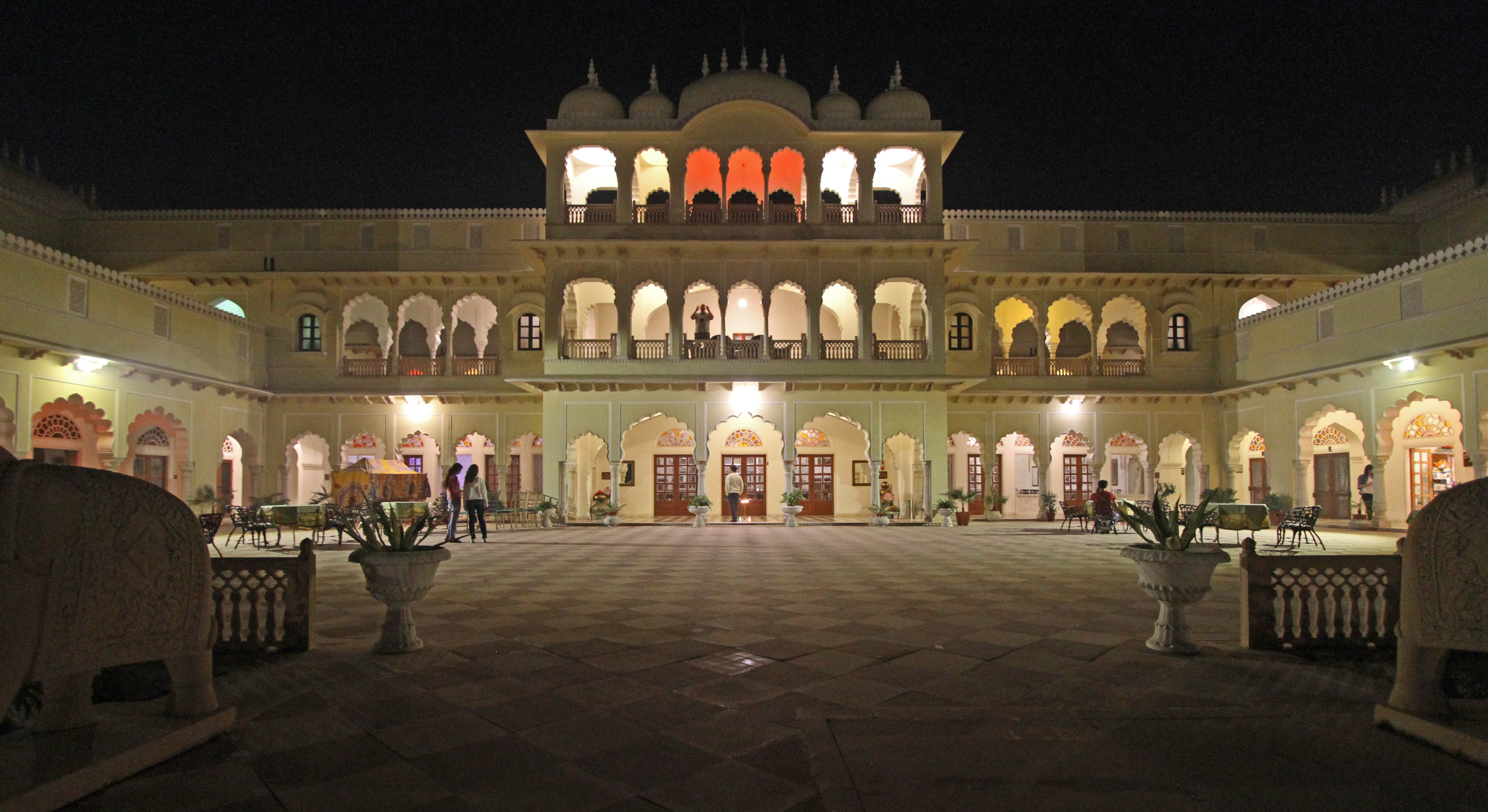 Laxmi Vilas Palace (Bharatpur)